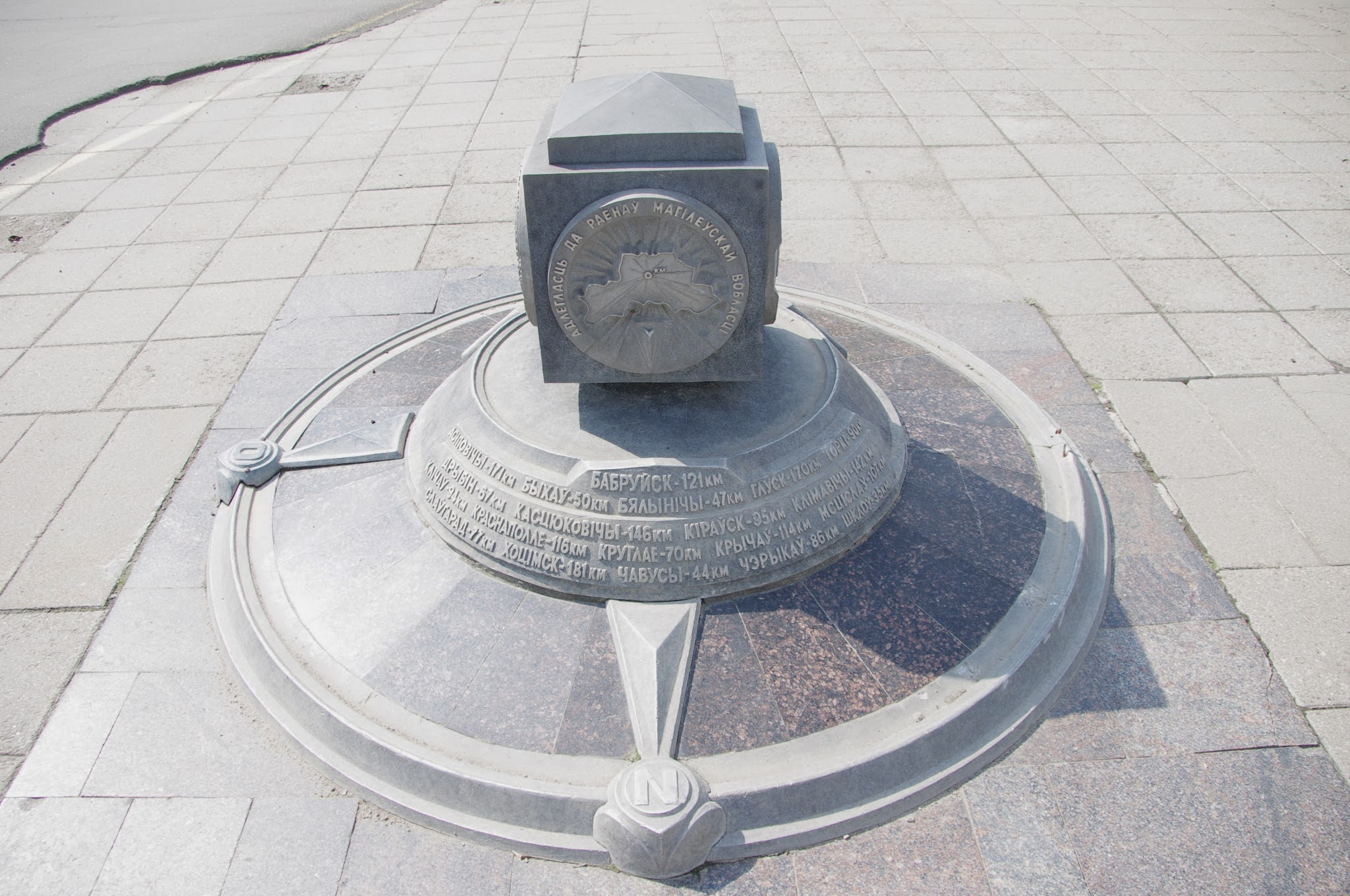 Lieninski District, Mogilev, Belarus